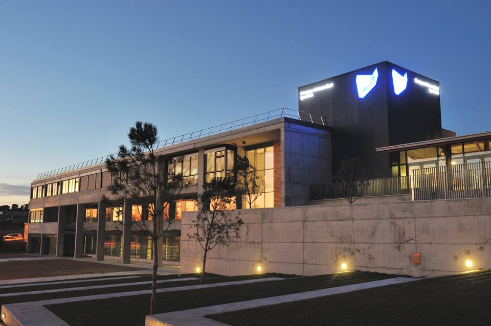 Las instalaciones del Campus.